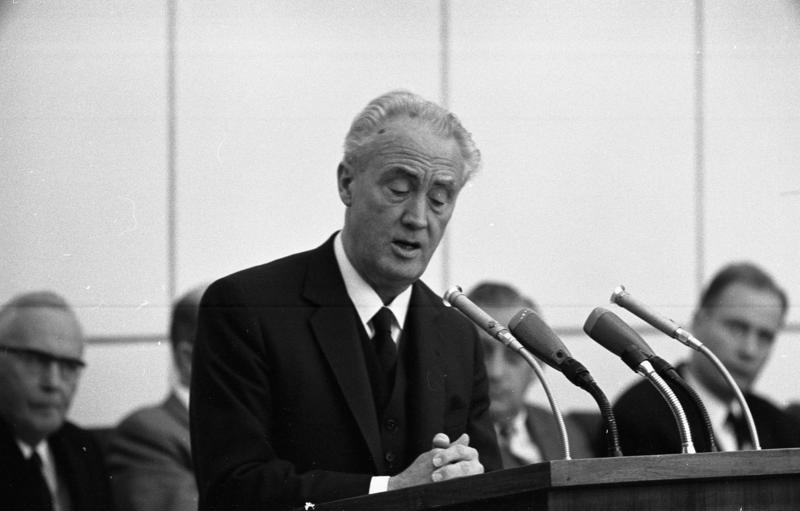 Plenarsitzung im Bundesrat. Sprecher BM Gradl